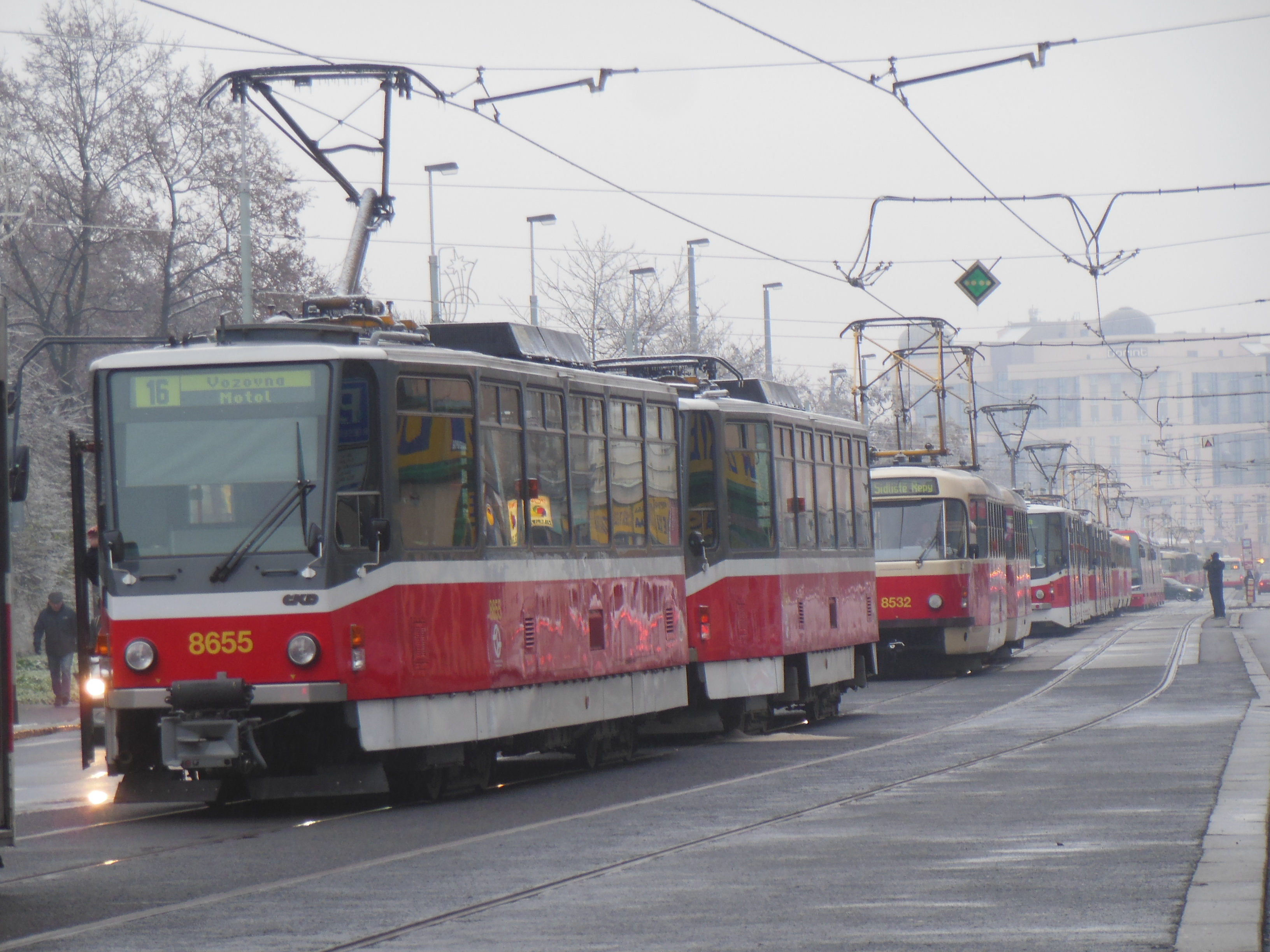 Praha-Žižkov. Ledovková kalamita 2. prosince 2014, odstavené tramvaje mezi zastávkami Flora a Olšanské hřbitovy.